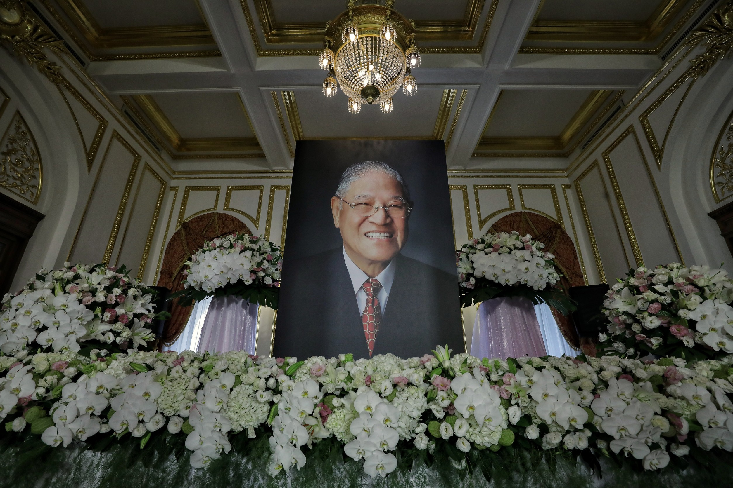 中文（台灣）: 總統及副總統赴故李前總統緬懷追思會場致意